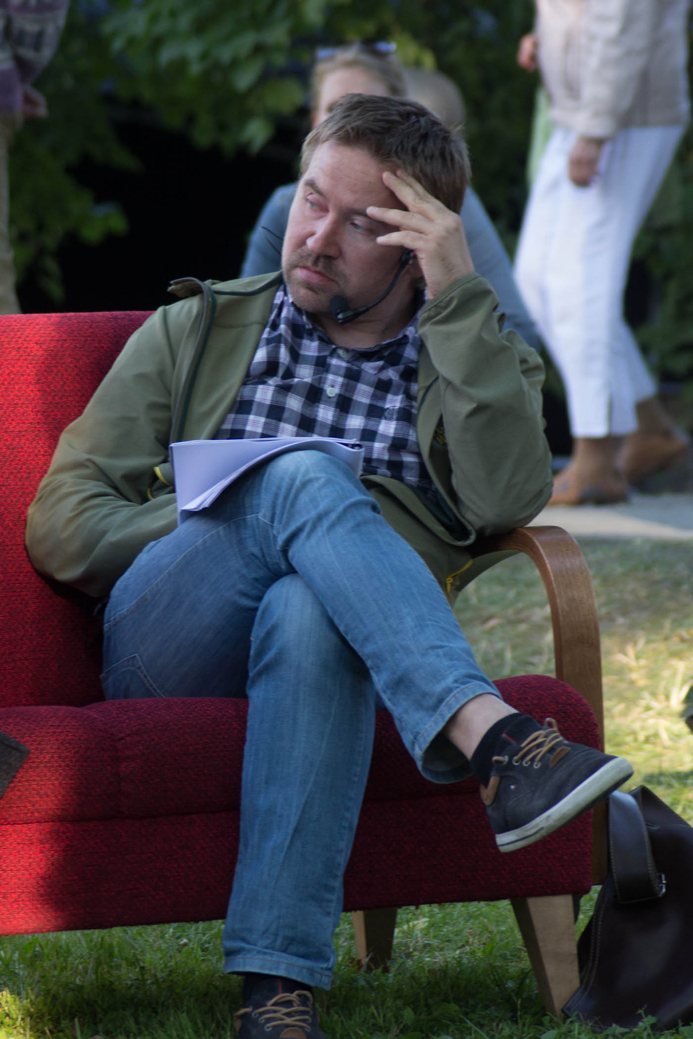 Indrek Ojari Arvamusfestivalil Ekspress Meedia alal.